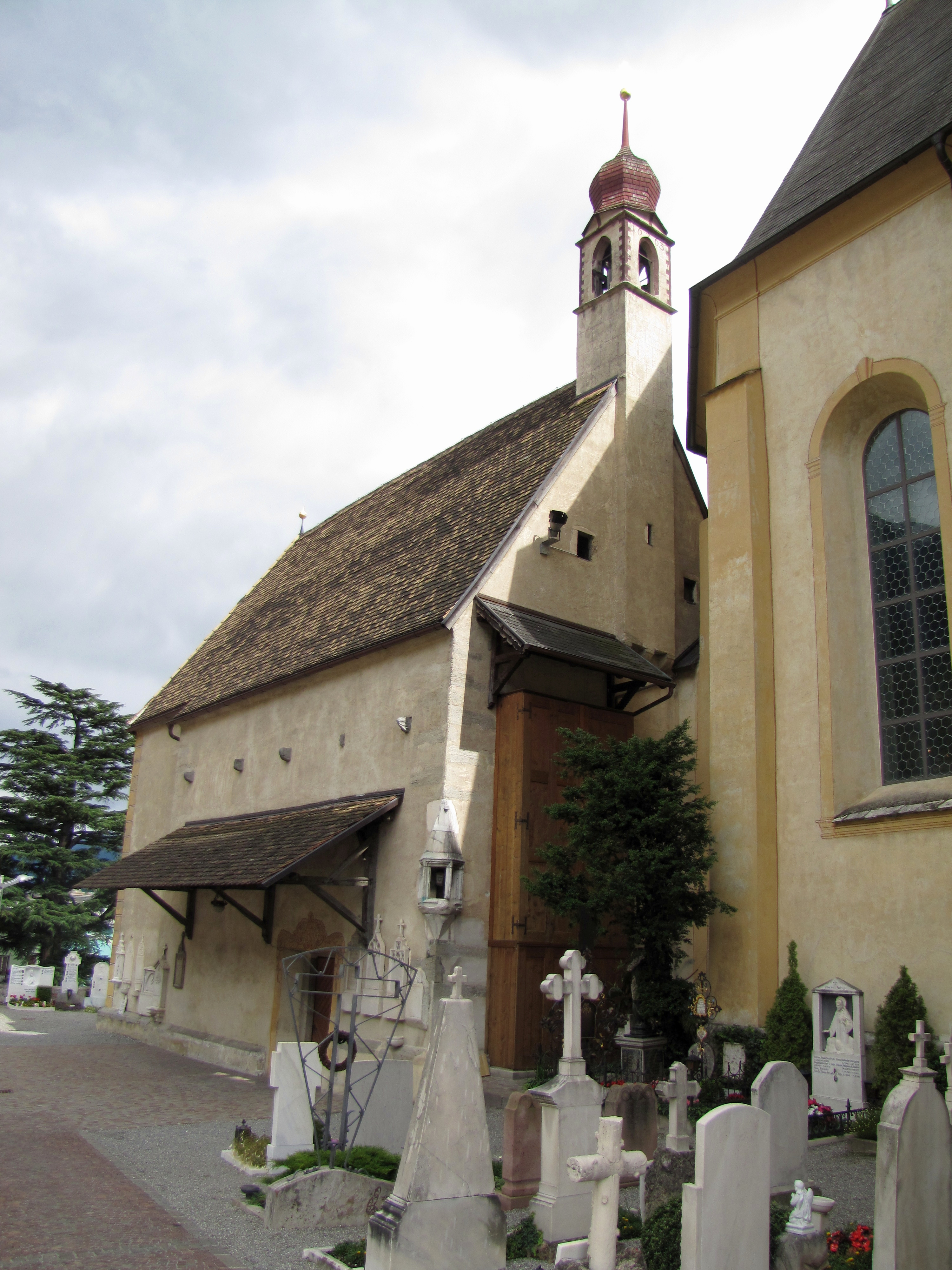 Friedhofskapelle St. Michael in Schlanders